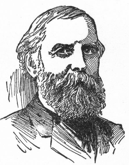 Lyman J. Gage